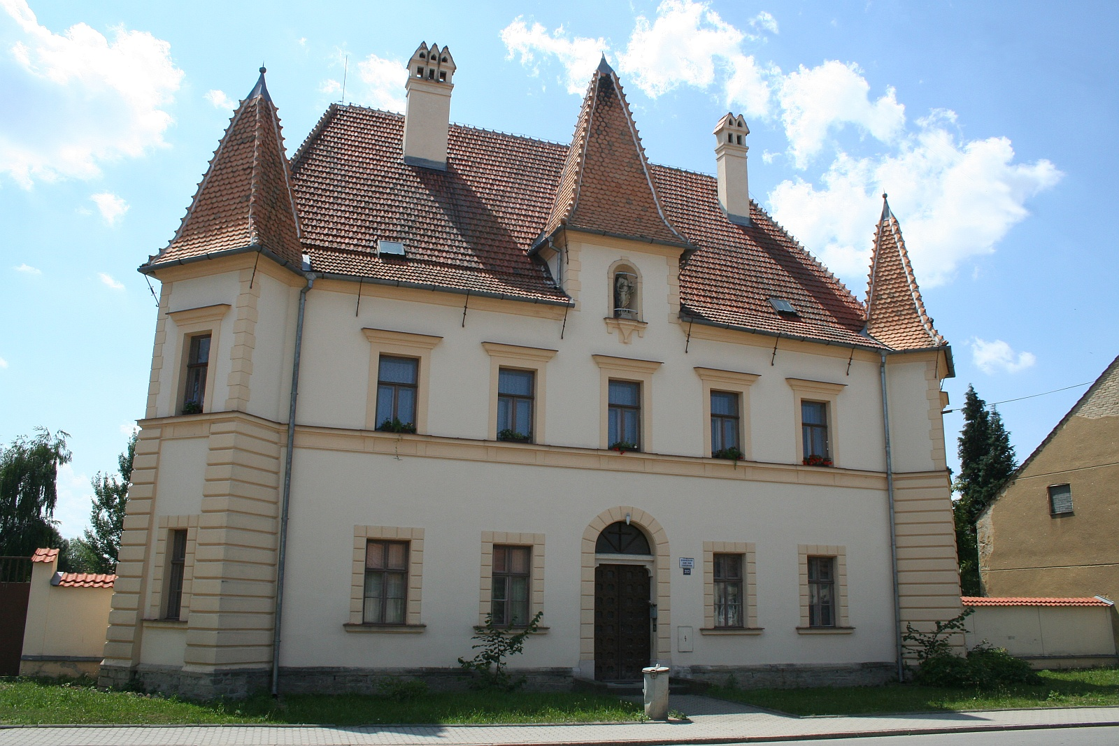 Budova fary